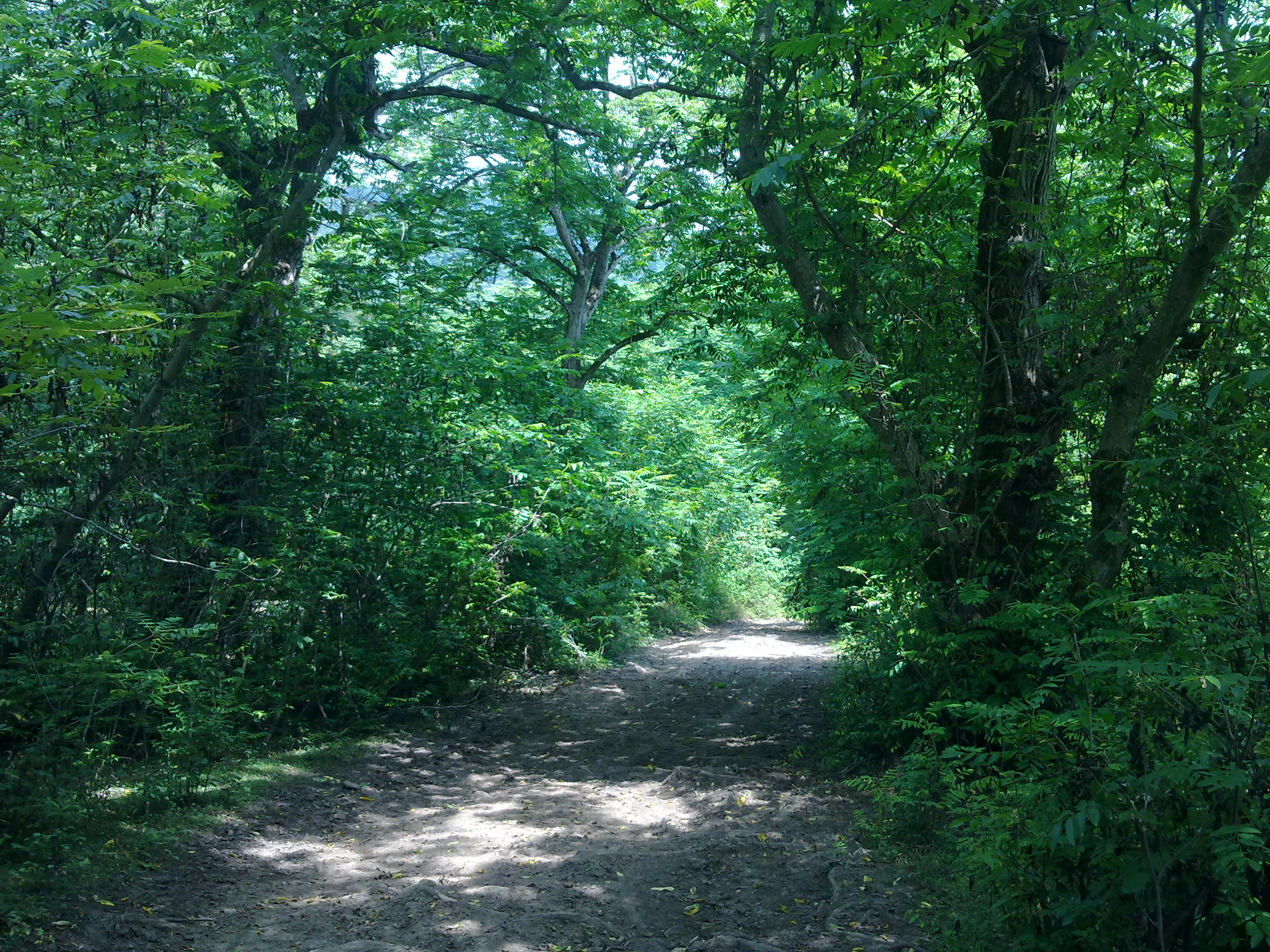 Ahoudasht-Sari-Mazandaran-Iran